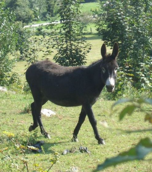 Burro negro en LLanes, Asturas 2007.